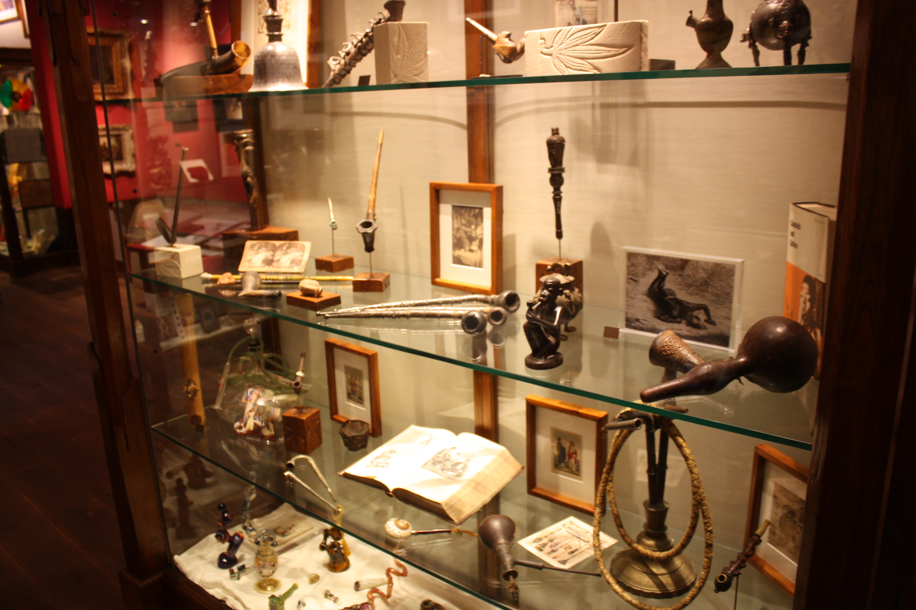 Wystawy w Muzeum Haszyszu i Marihuany w Amsterdamie